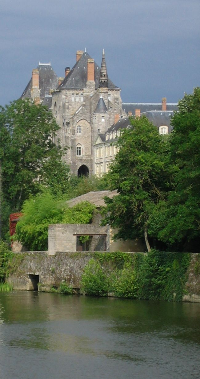 Abtei St. Pierre in Solesmes von Westen